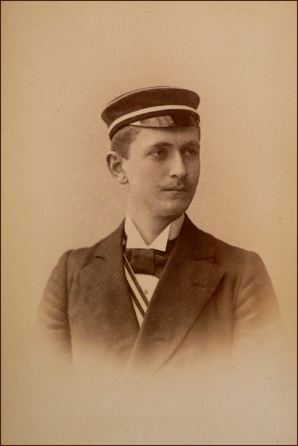 Porträtfotografie von Victor Foitzick